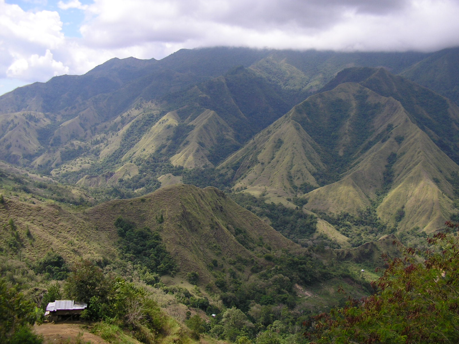 Gunung Nona, Enrekang - South Sulawesi (Indonesia)